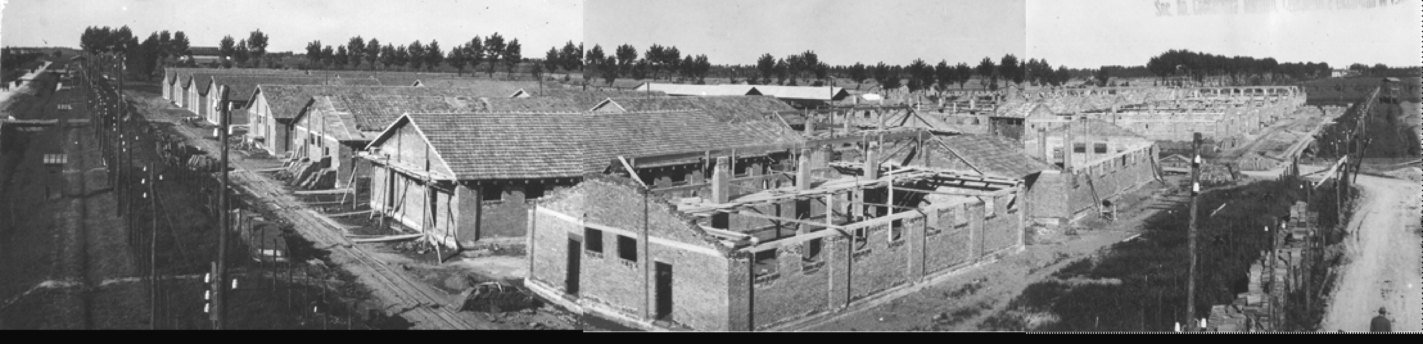 Panoramica del Campo di Fossoli